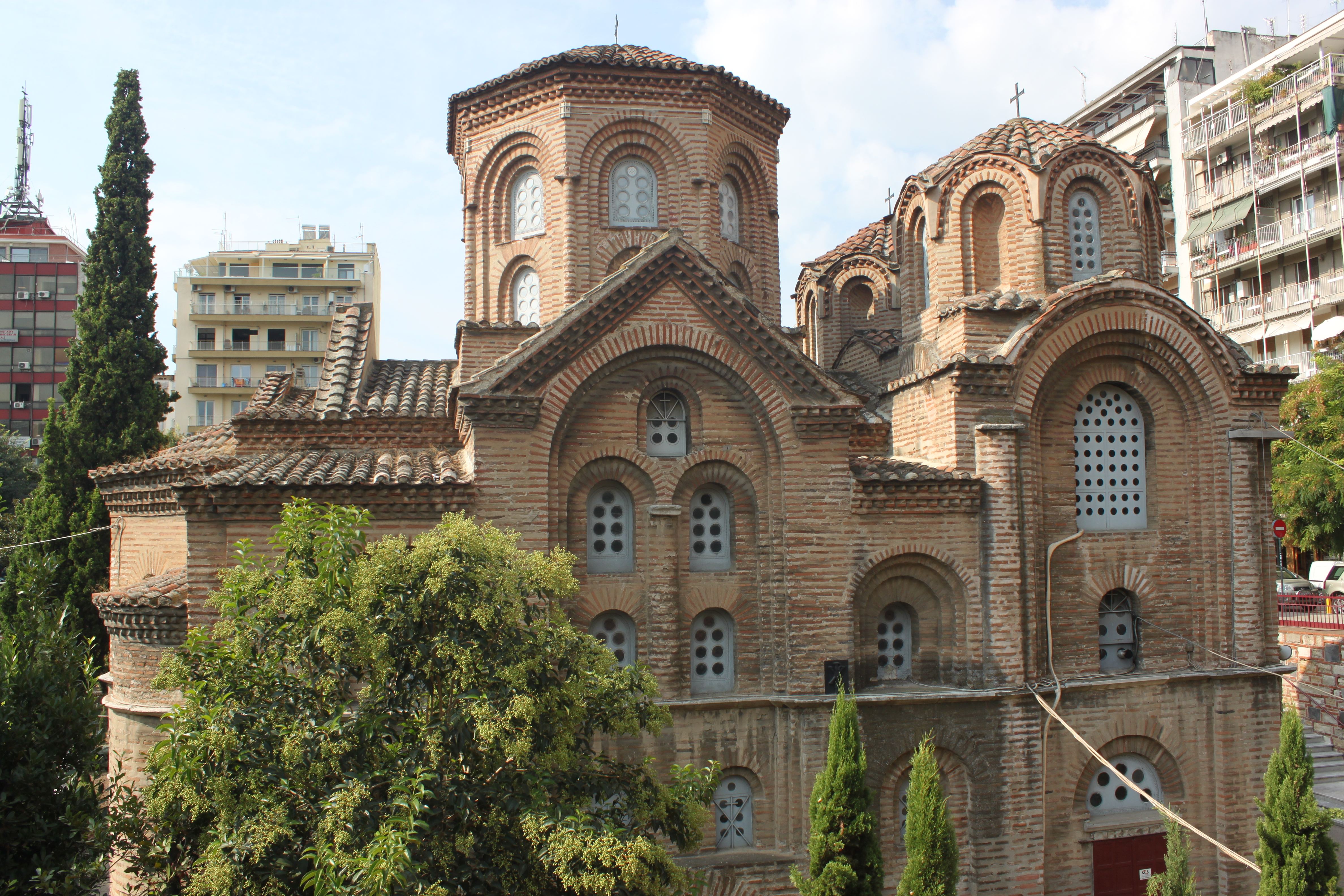 Eglise de la Panagia Chalkeon, façade nord